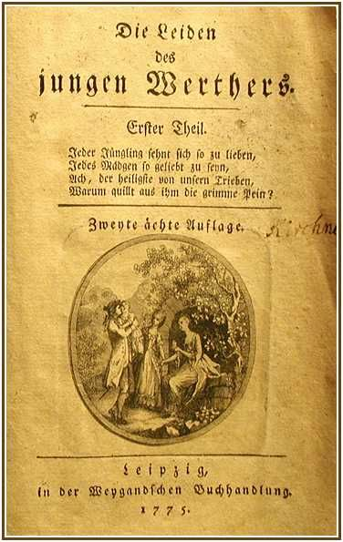 Autorisations : Bernd Seiler, auteur du site précédent : "Sie können das Bild gern verwenden" (vous pouvez diffuser l'image sans problème)